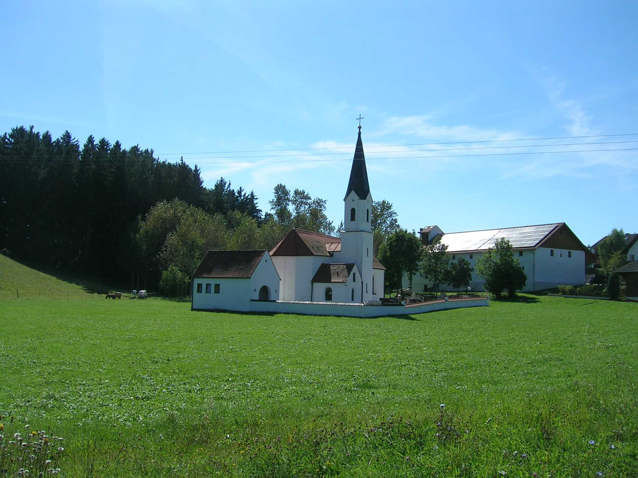 Filialkirche in Sielstetten: Gemeinde HörgertshausenThis is a photograph of an architectural monument.